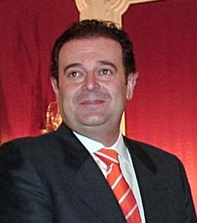 Gerardo Camps